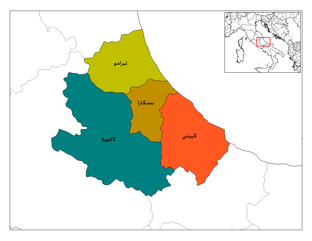 خريطة إقليم أبروتسو ومقاطعاته. مقاطعات إقليم أبروتسو. مقاطعات إقليم أبروتسو الإيطالي بالعربية